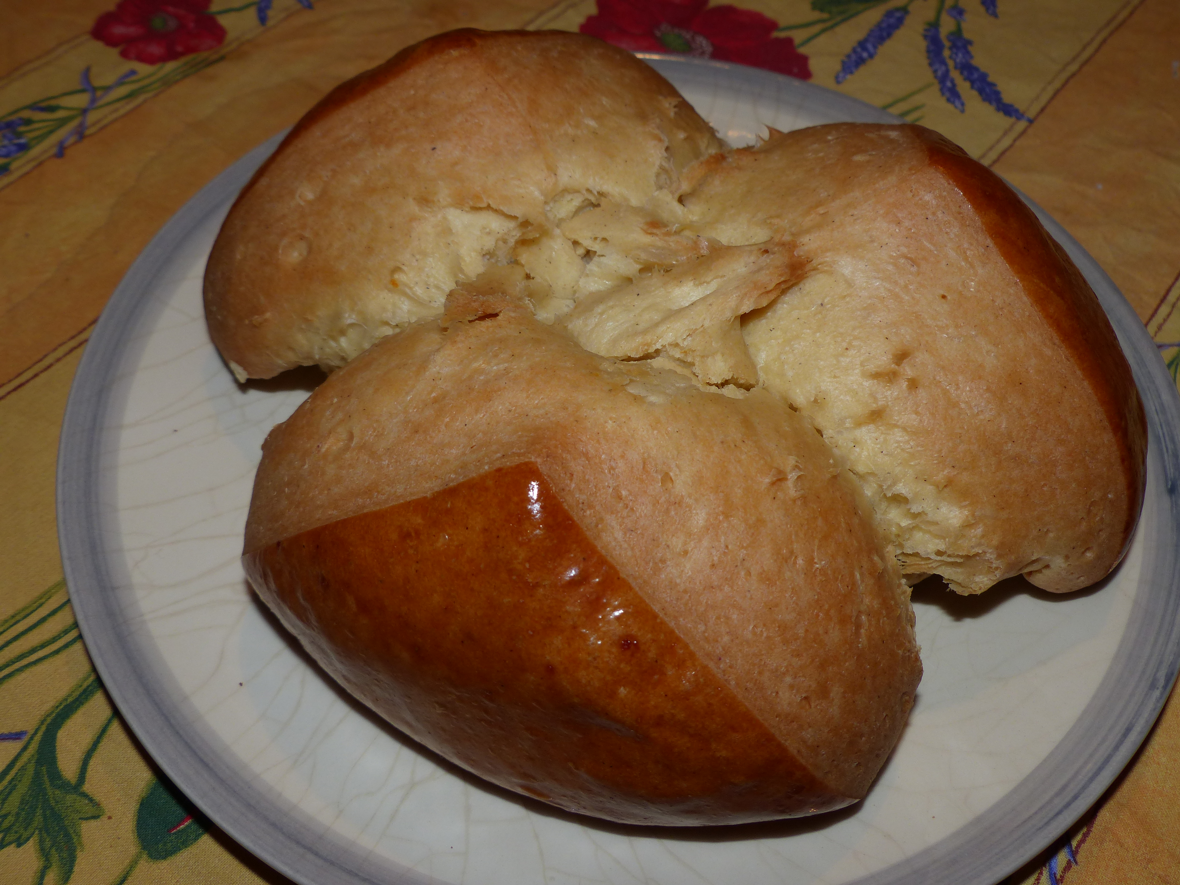 Österreichische Osterpinze, Wien (Bäckerei Aida)